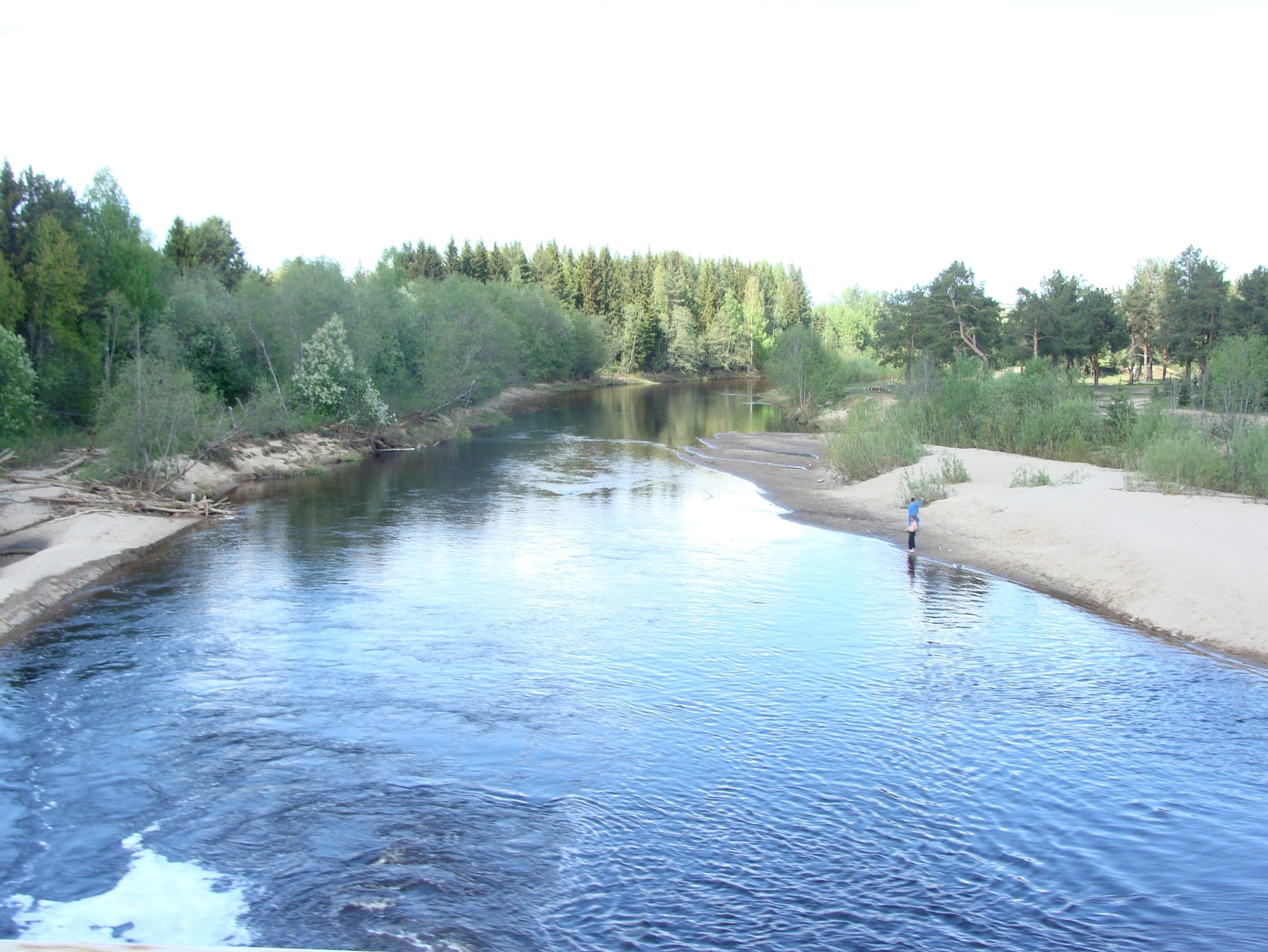 Река Лименда. Вид с моста на дороге Котлас-Коряжма